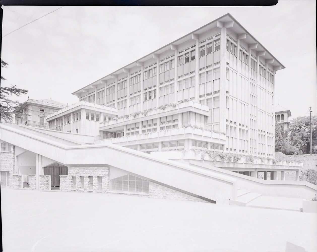 Genova. Complesso scolastico nel quartiere Albaro, su progetto degli architetti Cesare Fera e Luciano Grossi Bianchi. Servizio fotografico : Genova, 1964 / Paolo Monti. - Buste: 8, Fototipi: 8 : Negativo b/n, gelatina bromuro d'argento/ pellicola ; 10X12. - ((Serie costituita da 8 negativi identificati con i nn.: 8443-8450. La suddetta serie è contenuta nella scatola identificata con la numerazione G8001/8500. - Fonte: Agenda di Paolo Monti: Monti/ 2/ 6 giugno 1964 - 31 marzo 1966/ 8194-12420 (1964-1966), presso Archivio Paolo Monti